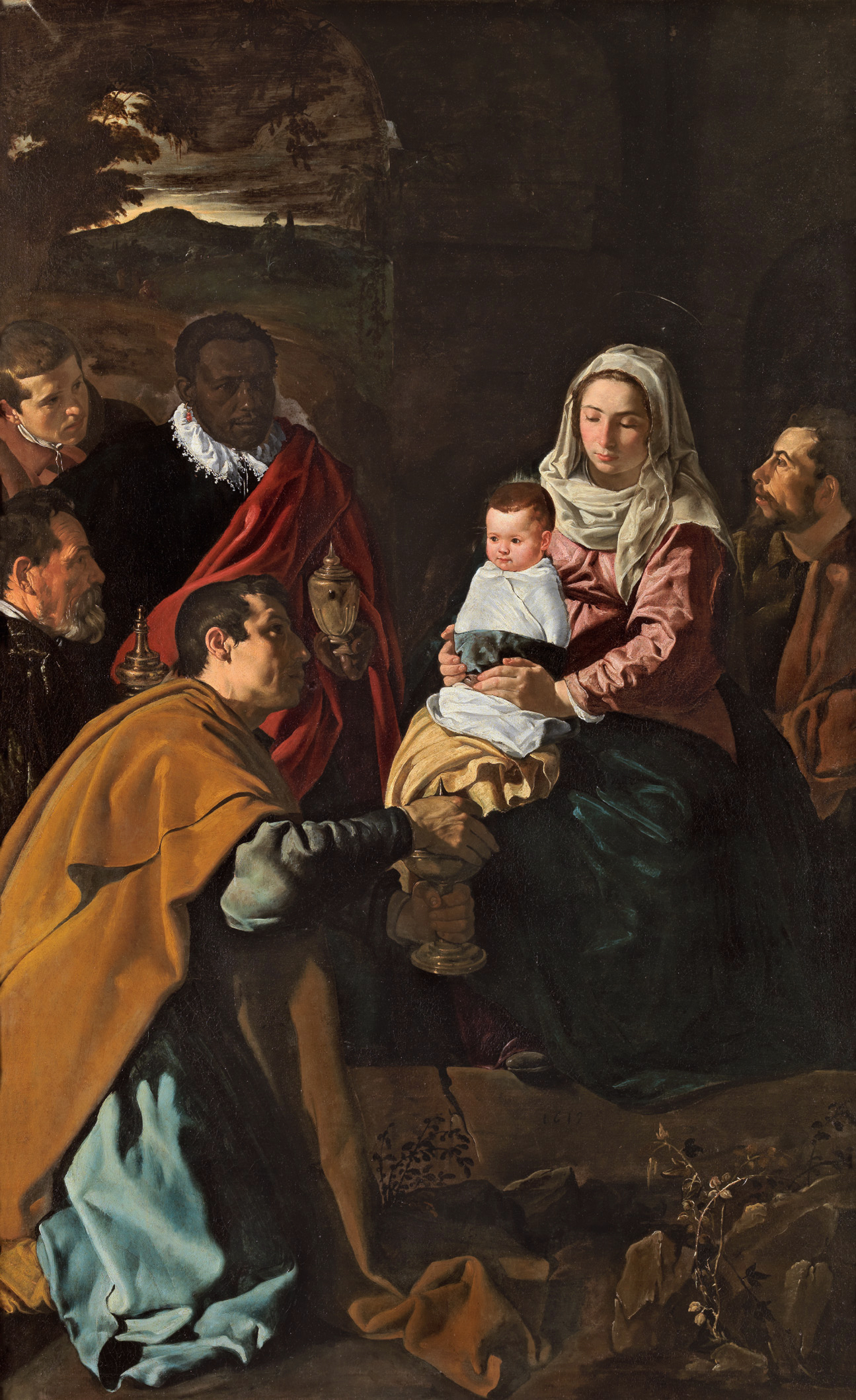 La obra representa el momento en que el Niño Jesús fue adorado por los tres Reyes magos.